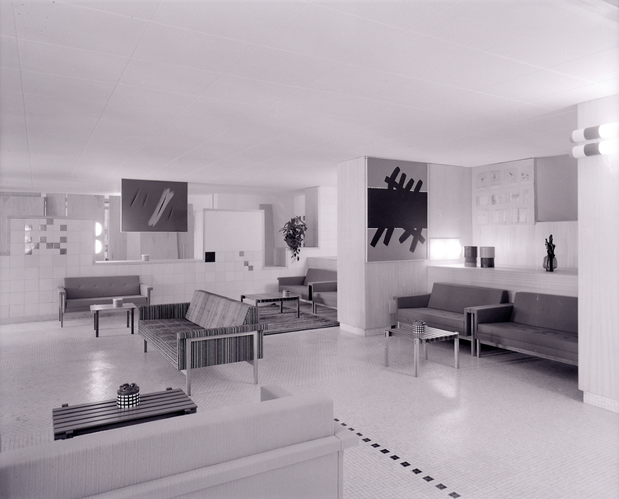 Servizio fotografico : Milano, 1960 / Paolo Monti. - Buste: 3, Fototipi: 3 : Negativo b/n, gelatina bromuro d'argento/ pellicola ; 10x12. - ((Serie costituita da 3 negativi identificati con i nn.: 21949-21951. Numerazione parallela: 3042, 3045, 3047. Sulla busta G21949 manoscritto: ""Arch/ Sottsass". La suddetta serie è contenuta nella scatola identificata con la numerazione 21949/ 22087. Sulla scatola manoscritto con pennarello nero: "XII Triennale/ 1960/ 2/ 3121-3142 ". La scatola è a sua volta contenuta in una scatola grande col coperchio giallo. - Occasione: Documentazione della XII Triennale del 1960, intitolata La casa e la scuola: "Esposizione internazionale delle arti decorative e industriali moderne e dell'architettura moderna". L'esposizione si tenne presso il Palazzo dell'Arte.